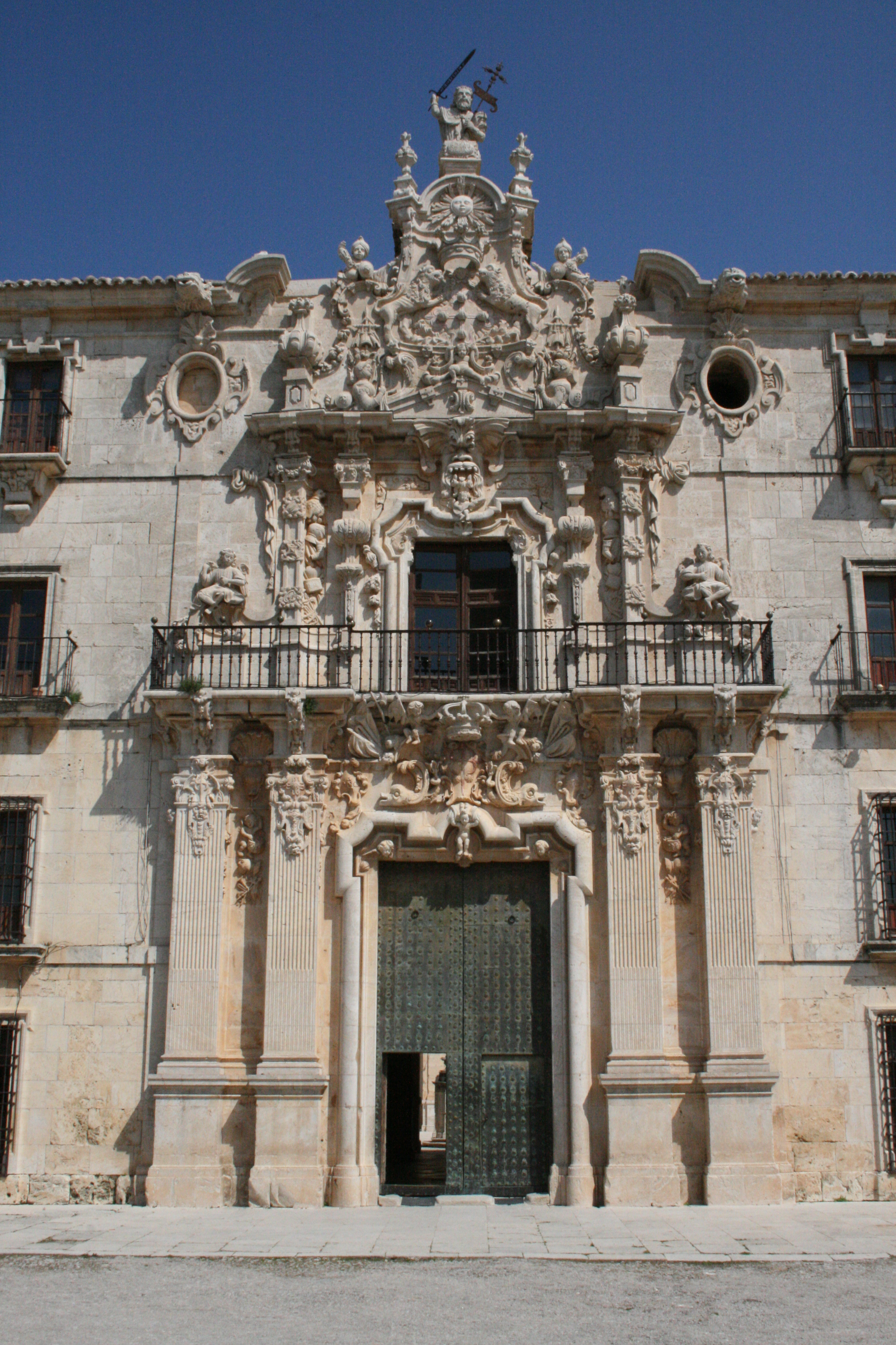 Monasterio de Uclés, Cuenca, España - Entrada principal